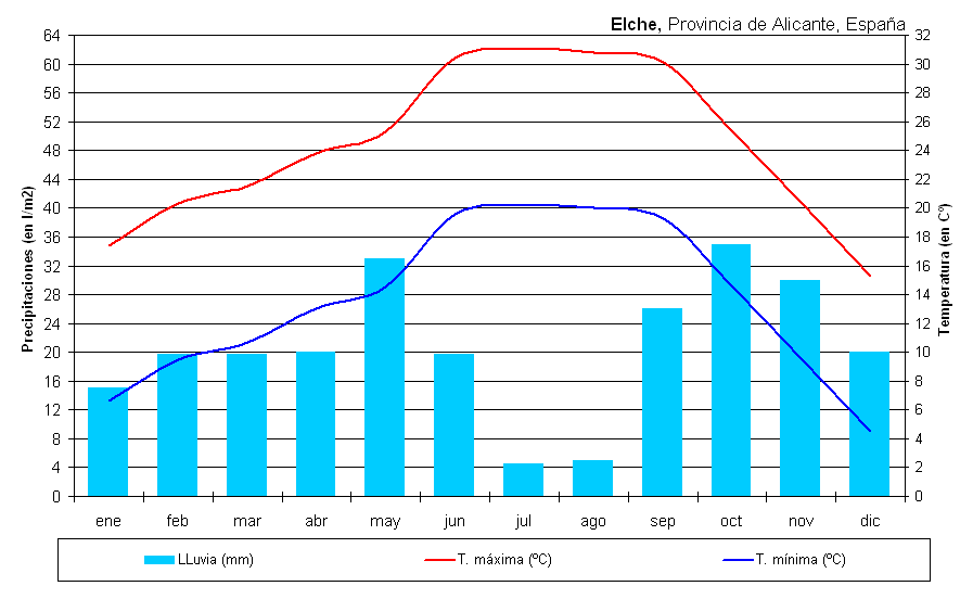 Climograma de la ciudad de Elche